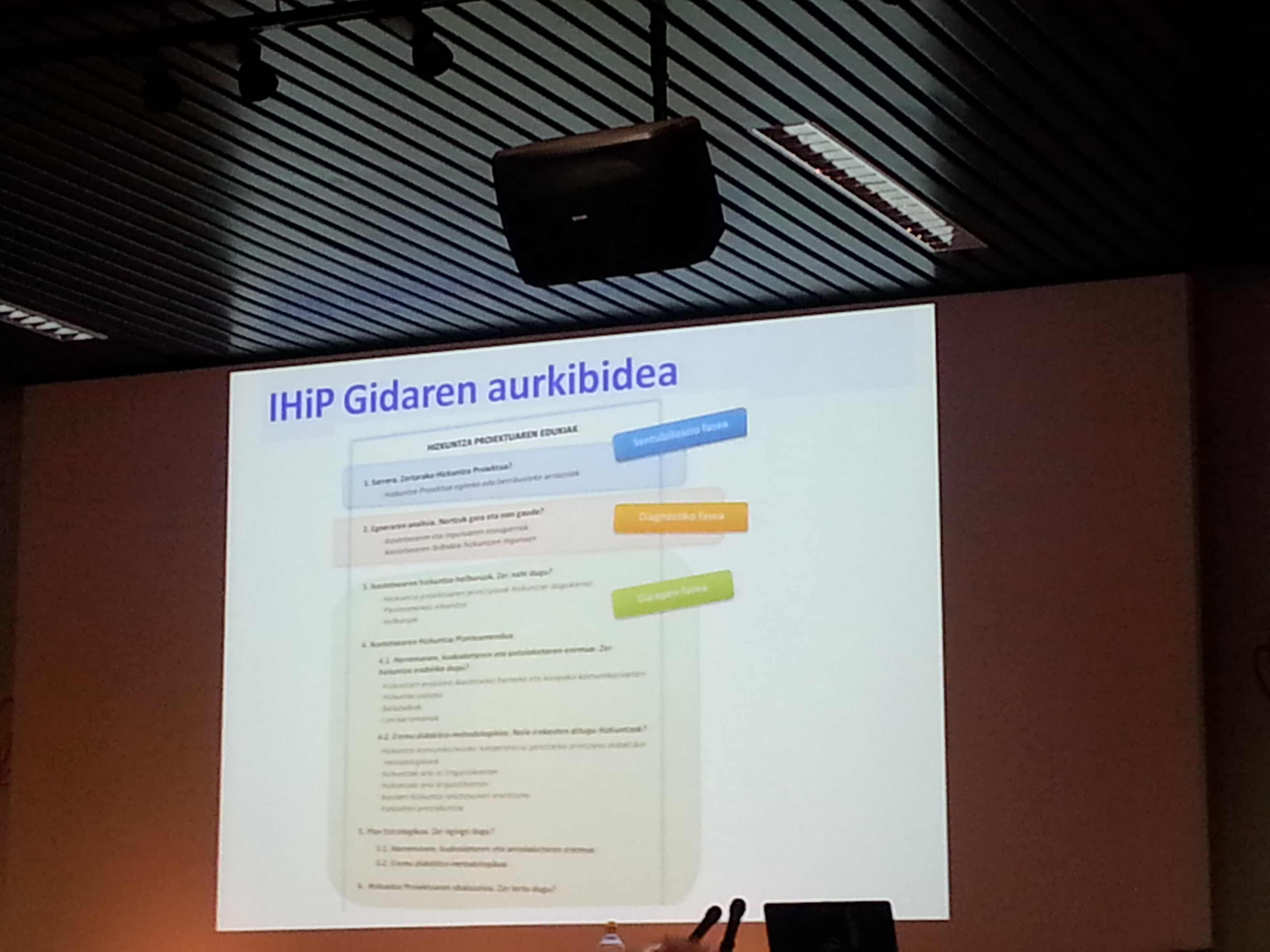 Jendaurrean erabilitako aurkezpen digital baten adibidea.